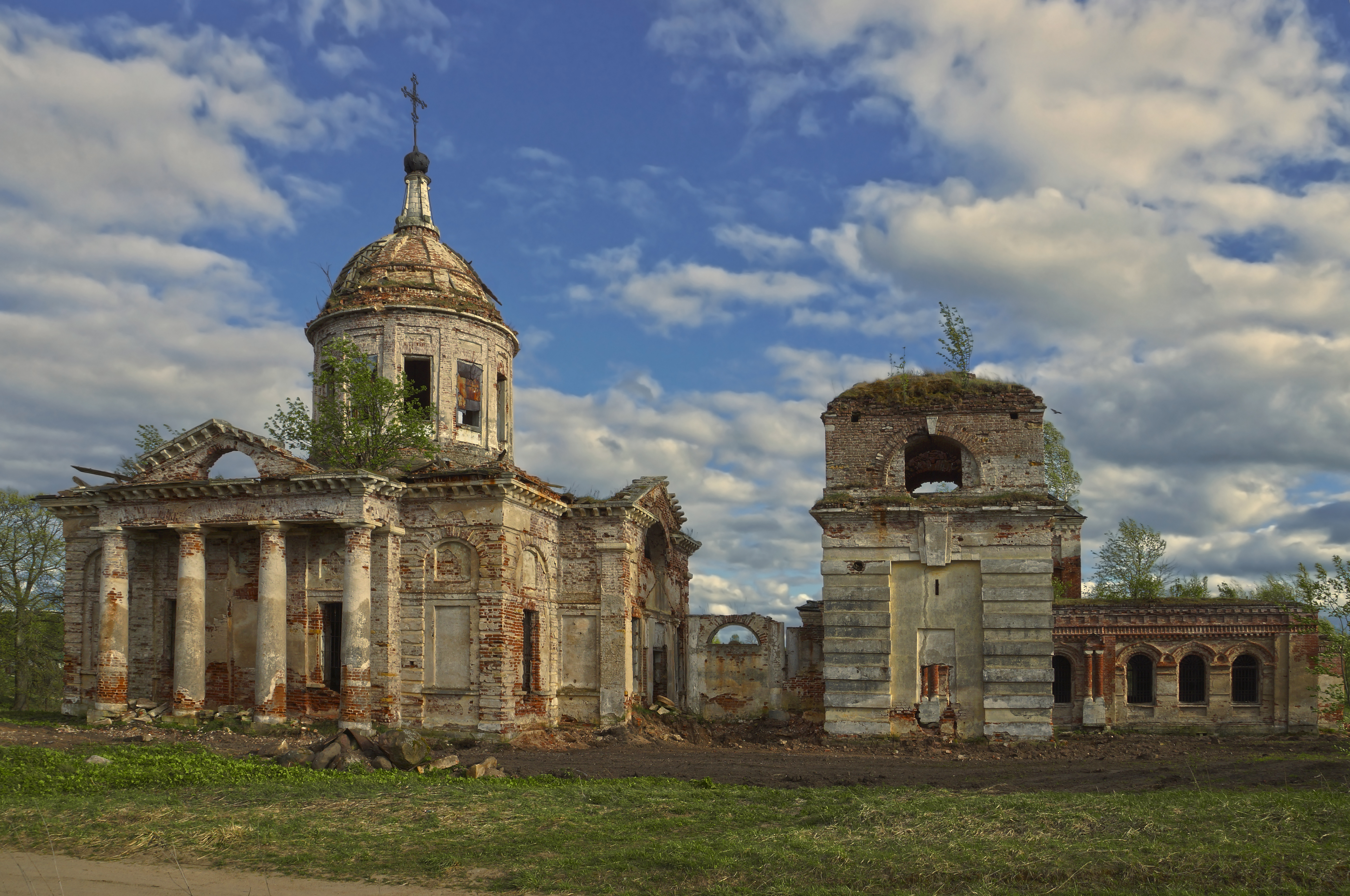 Храмовый комплекс: Кунгалово, Торжокский район, Тверская область